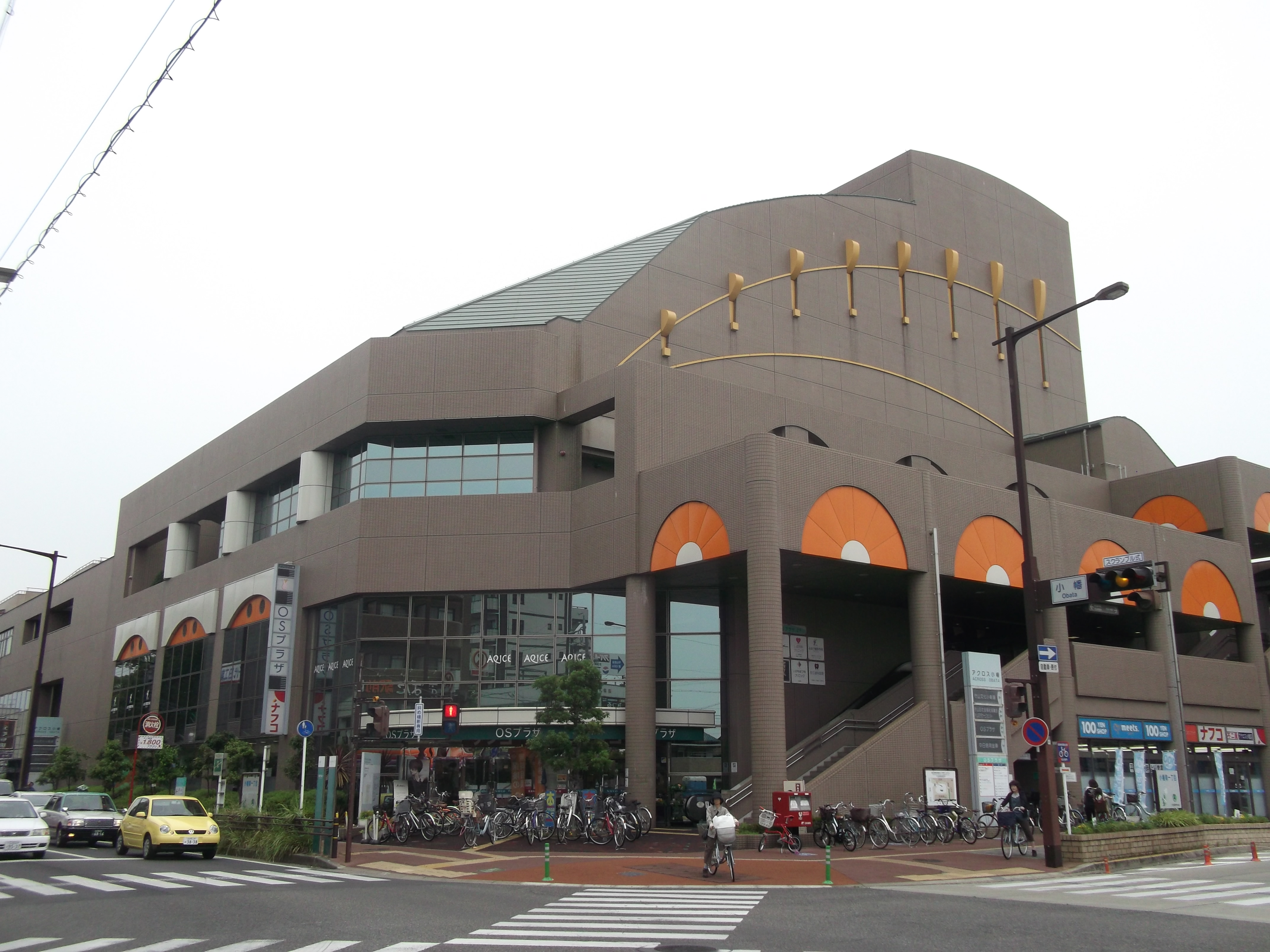 名古屋市守山区小幡南一丁目のアクロス小幡（B街区）を北側公道西側より撮影